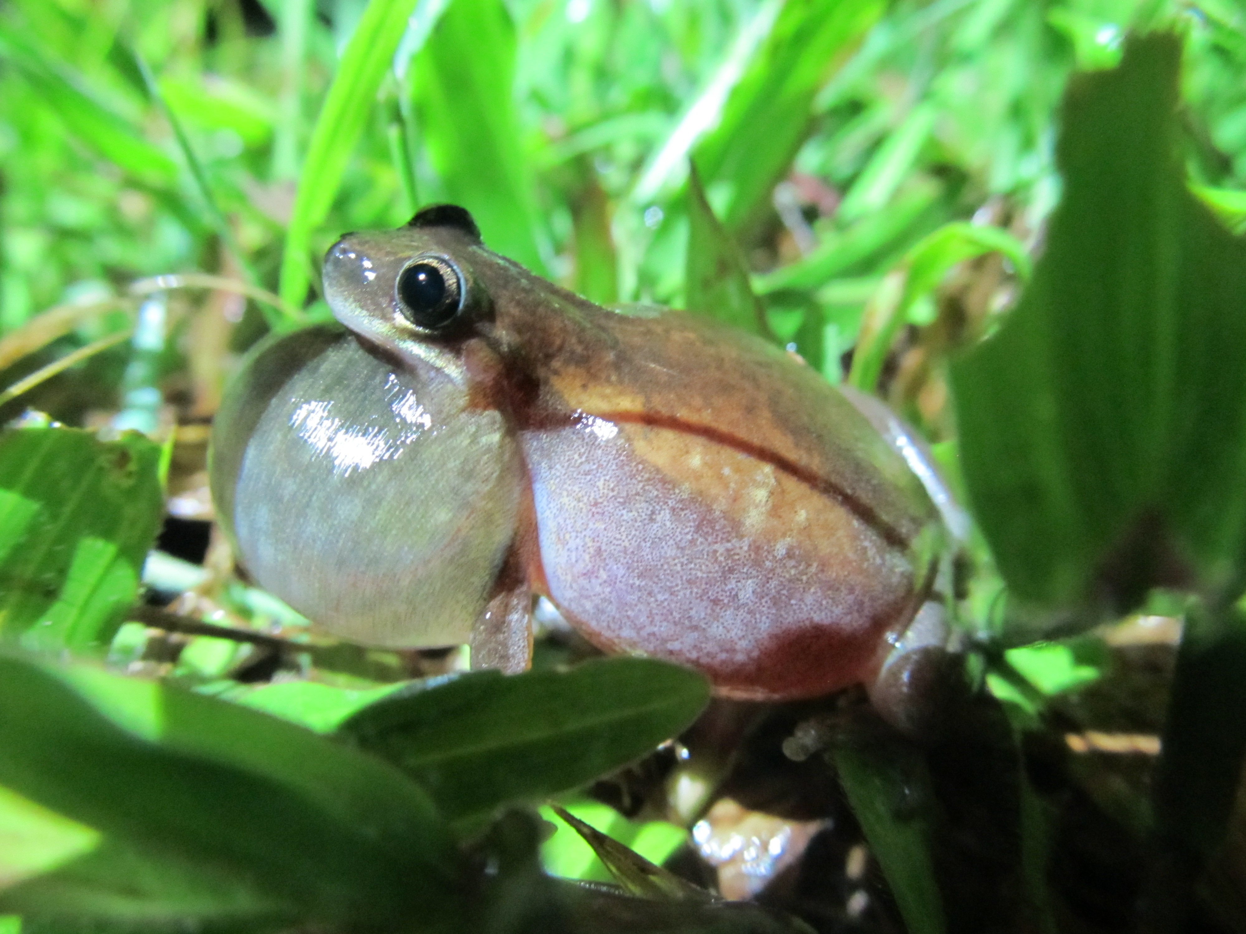 Cairns, QLD